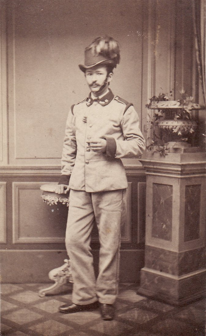 Rudolf Lavant eigentlich Richard Cramer, auf dem Bild 22 Jahre alt, hier in der Ausgehadjustierung eines Kaiserjägers 1866.